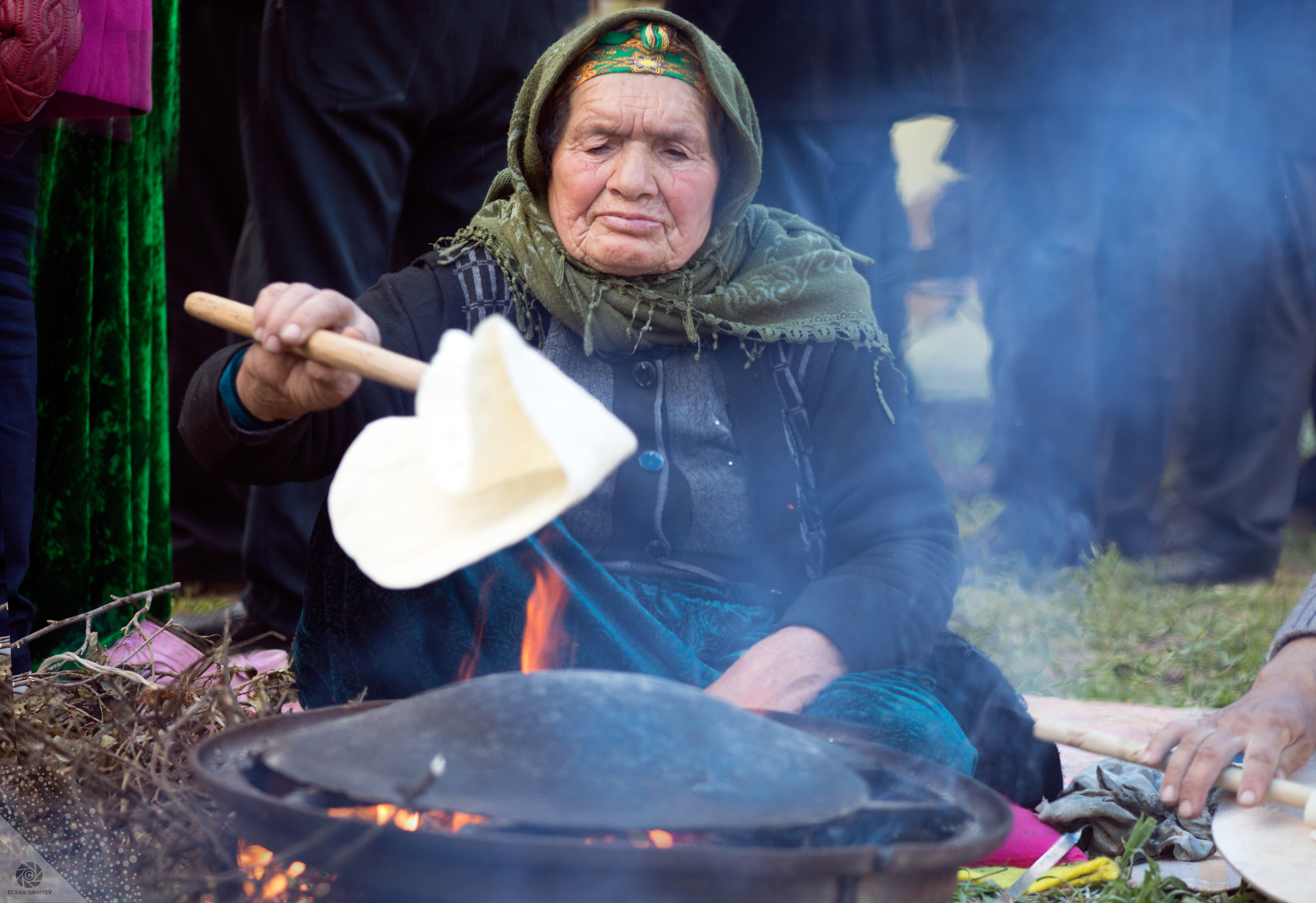 Azərbaycan mətbəxinə xas lavaş